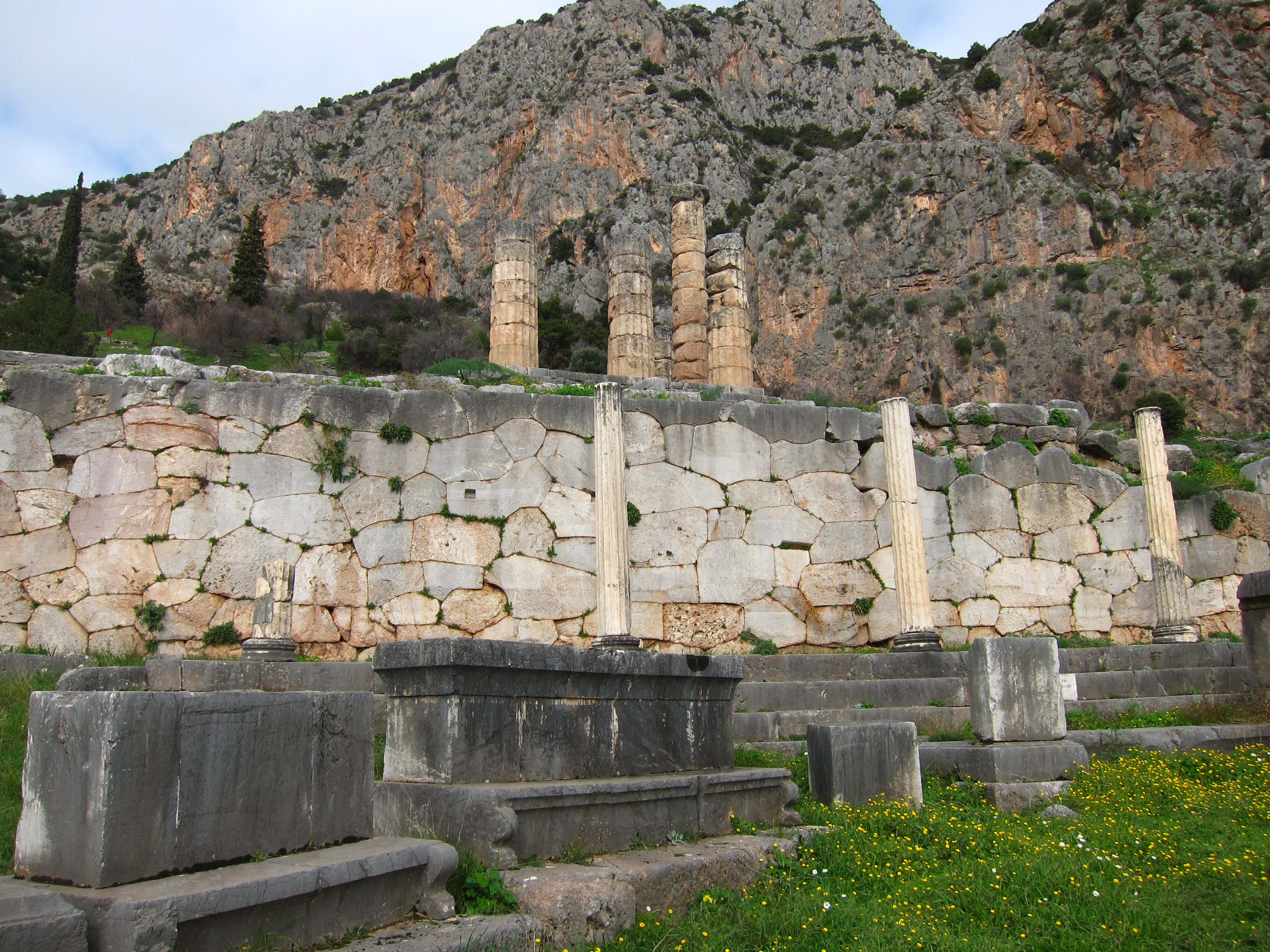 Δελφοί«Δελφοί»